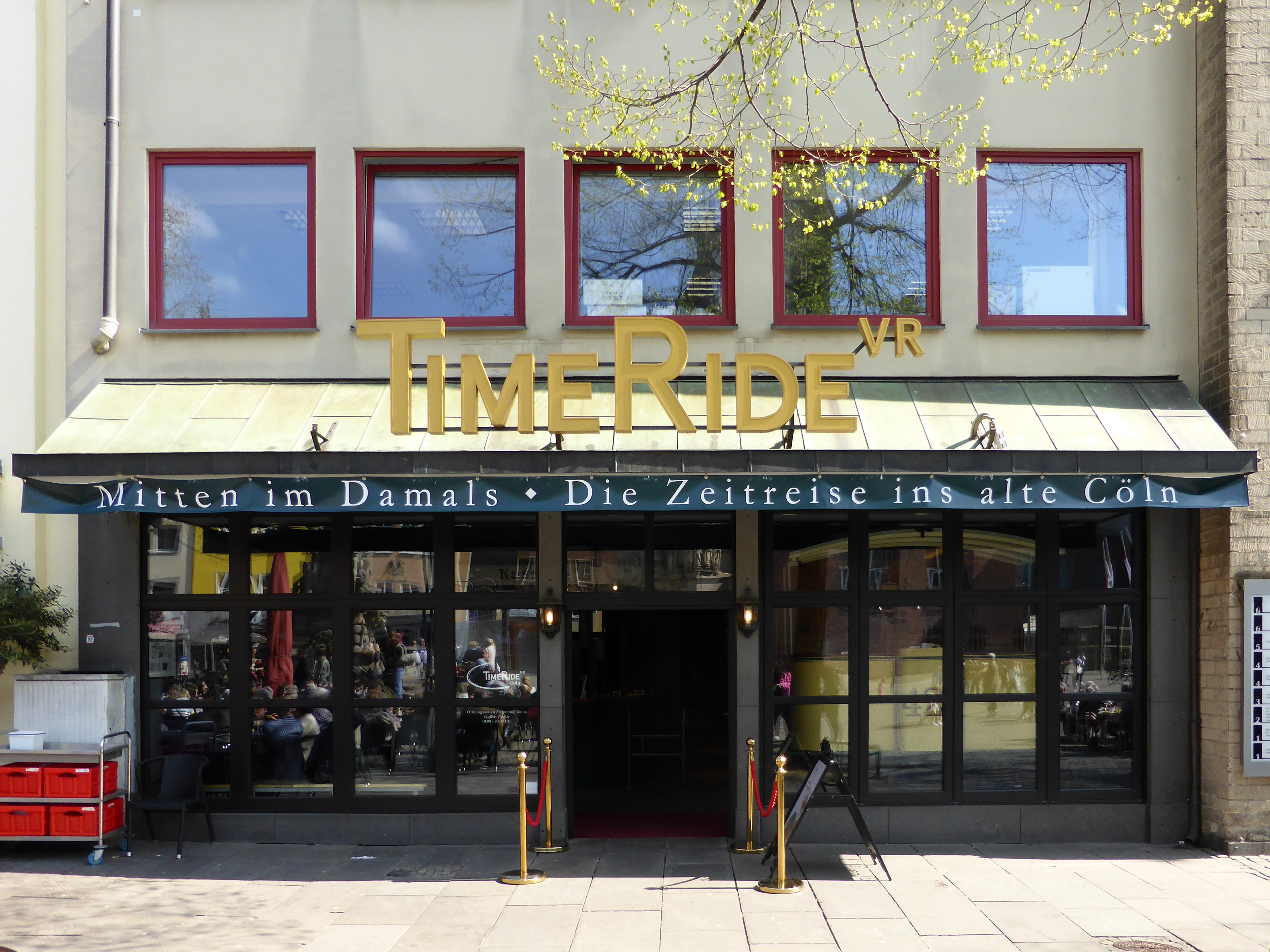 TimeRide VR Cöln, Alter Markt 36-42, Köln. This is a photograph of an architectural monument.